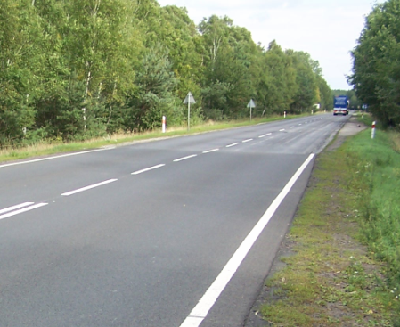 Author: Yves6 - Road 10, Solec Kujawski, Poland